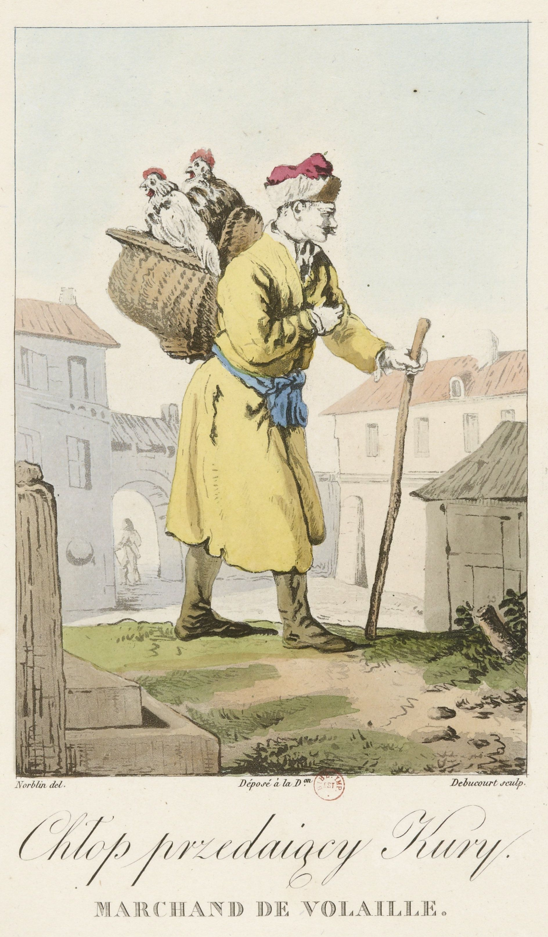 Крестьянин, продающий кур